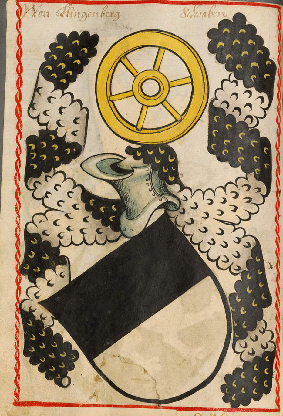 Scheibler'sches Wappenbuch, älterer Teil Klingenberg